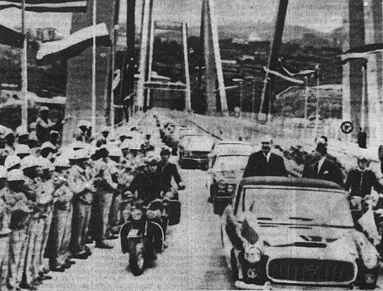 Il Presidente Saragat, in piedi sull'auto scoperta, percorre il grande viadotto applaudito dagli operai.